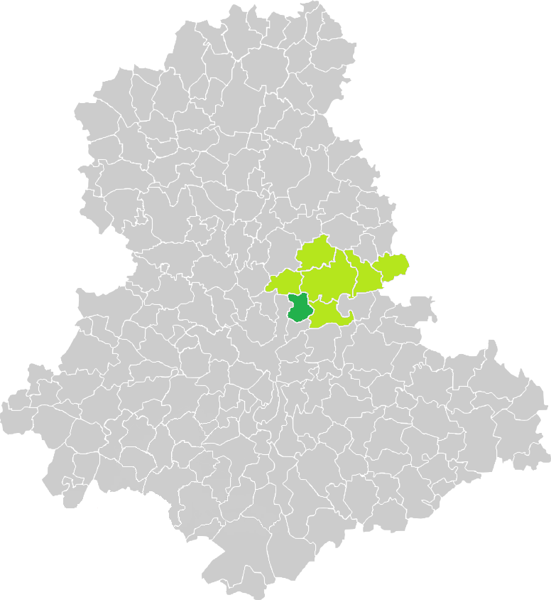 Carte de situation de la commune de Rilhac-Rancon (en vert foncé) dans le votre Canton (en vert clair) sur une carte des communes de la Haute-Vienne